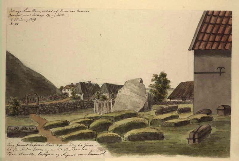 Jellinge Rune Stene, endeel af Gorm den Gamles Gravsted med Jellinge By og Kirke d 25 Juny 1819. No. 44, Udgivet: 1819, Omfang: 224 x 340 mm : Akvarel, Forfatter: Rawert, Ole Jørgen, 1786-1851, Jelling - Danmark ; Runesten, Rawerts maleriske Reise IV, 27 b, neg., neg. farvepositiv 55x80, neg. farvepositiv 80x125, skan 4_027b.tif